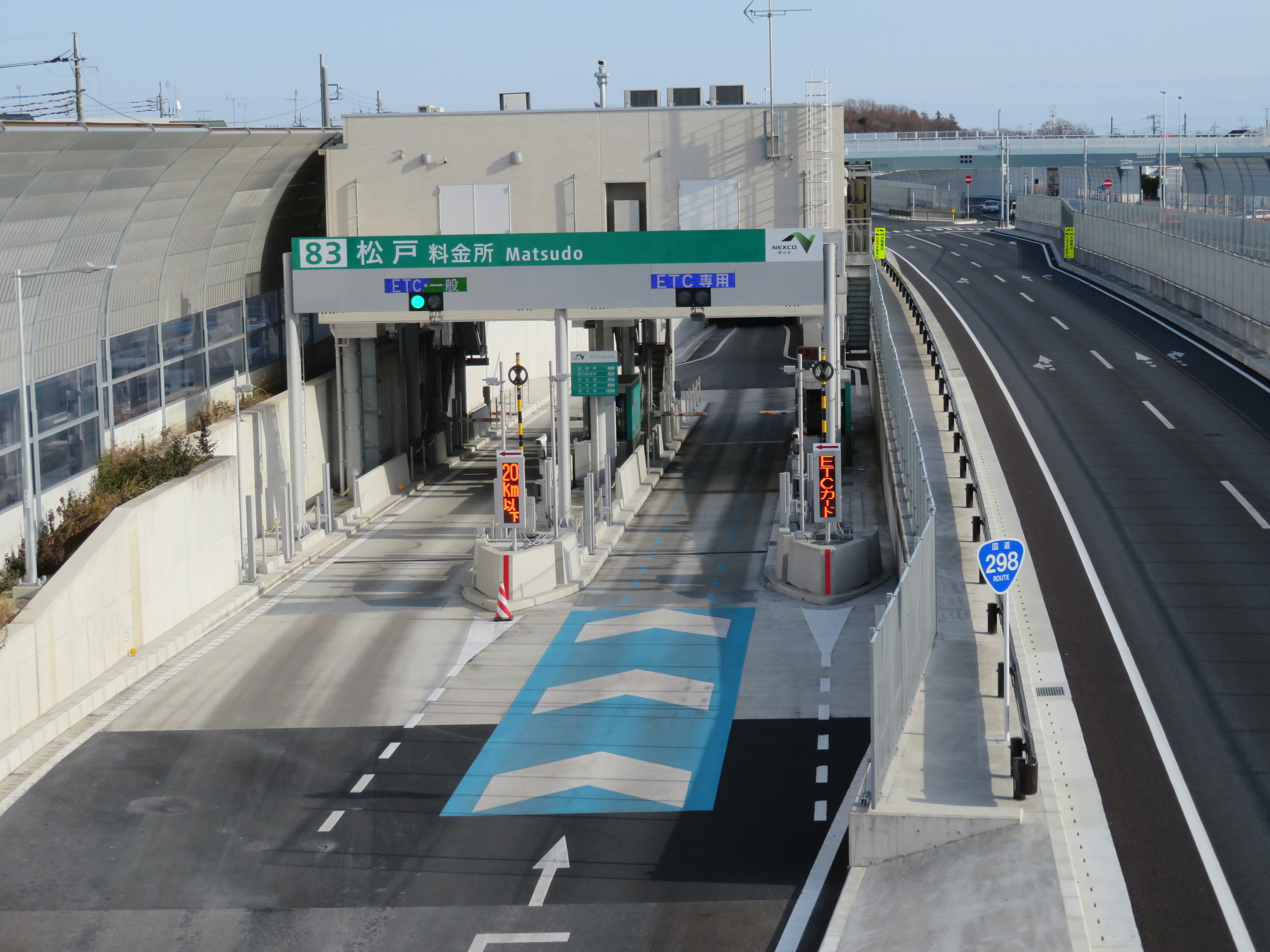 東京外環自動車道 松戸インターチェンジ入口 料金所付近 Canon PowerShot SX720 HS